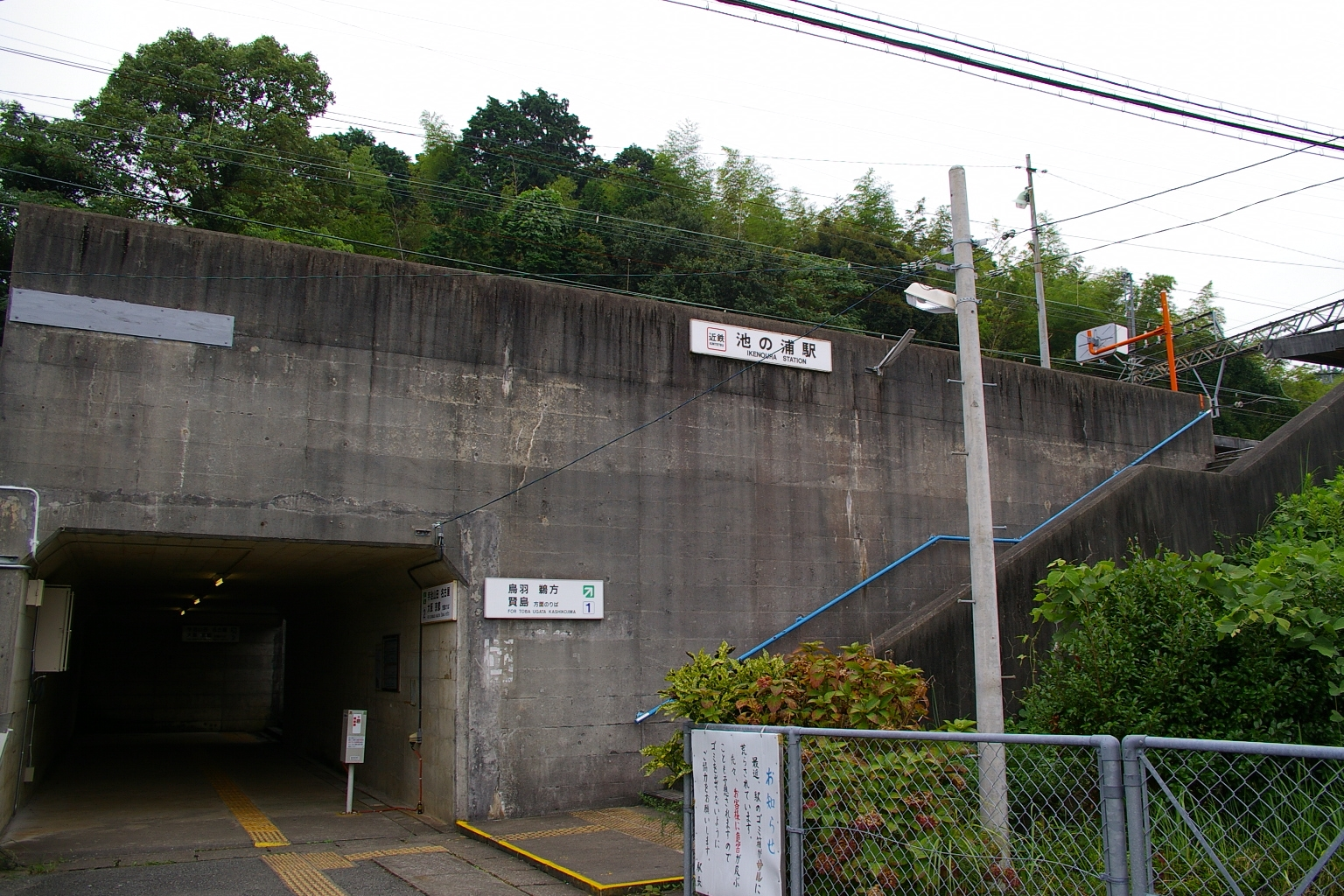 Ikenoura sta.